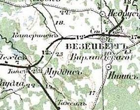 Вырезка из Военно-дорожной карты Европейской России Главного Штаба 1888 г. с изображением участка железной дороги Ревель - Санкт-Петербург, Тапс-Тарту